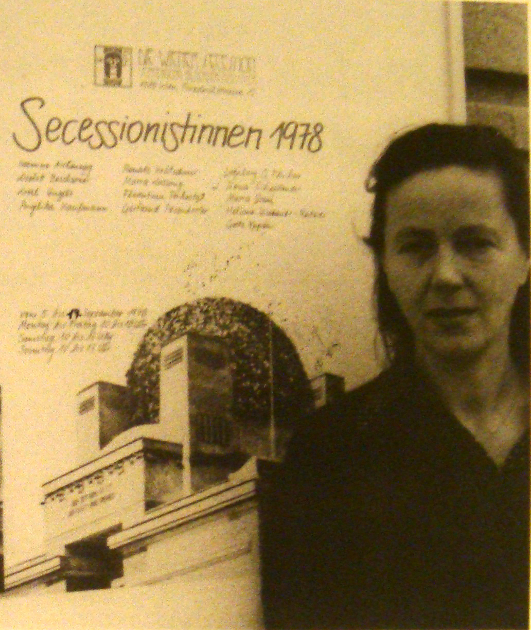 Florentina Pakosta In Front Of The Secession, Vienna 1978